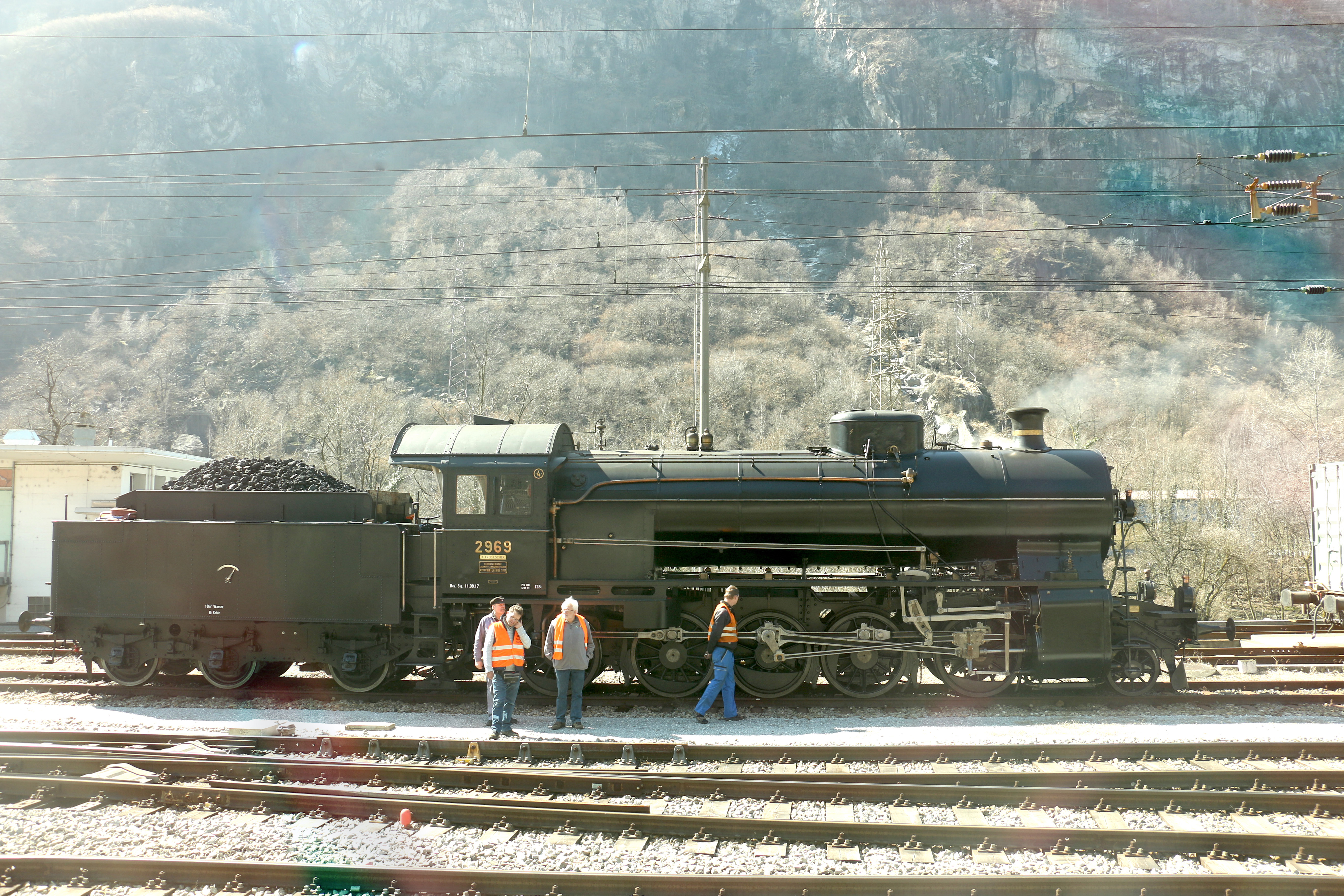 Dampflokomotive 2969 Alfred Escher (Lavorgo 2017)